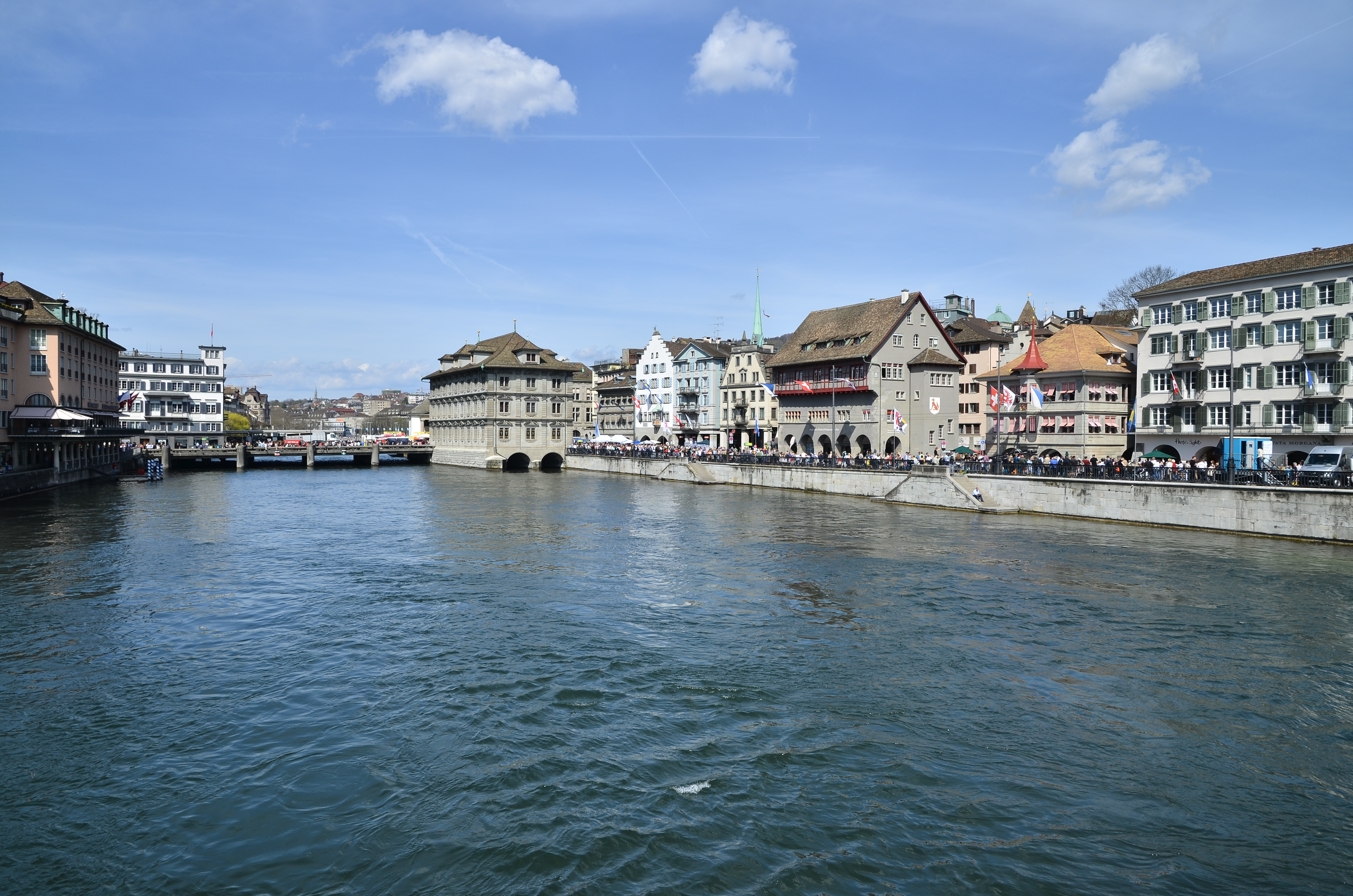 Gmüesbrugg, Rathaus, Zunfthaus zur Saffran, Zunfthaus zur Haue, Haus zum Rüden and Zunfthaus zur Zimmerleuten at Limmatquai in Zürich (Switzerland), as seen from Münsterbrücke towards Münsterhof.